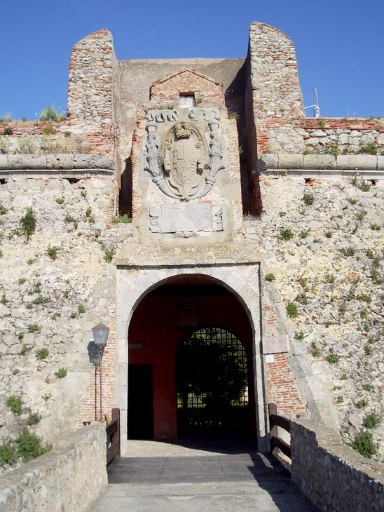 Ingresso Rocca aldobrandesca (Rocca Spagnola) Porto Ercole